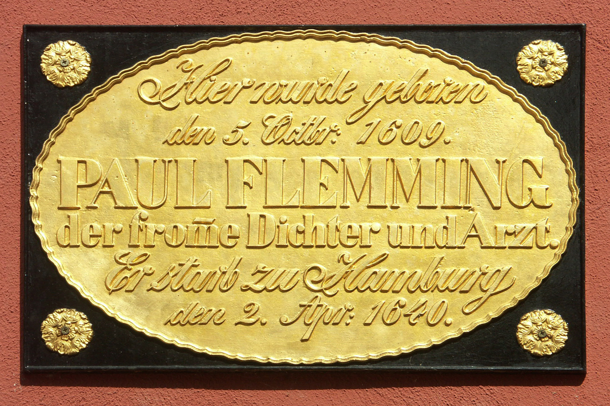 Gedenktafel am Geburtshaus von Paul Flemming in Hartenstein/Erzgebirge